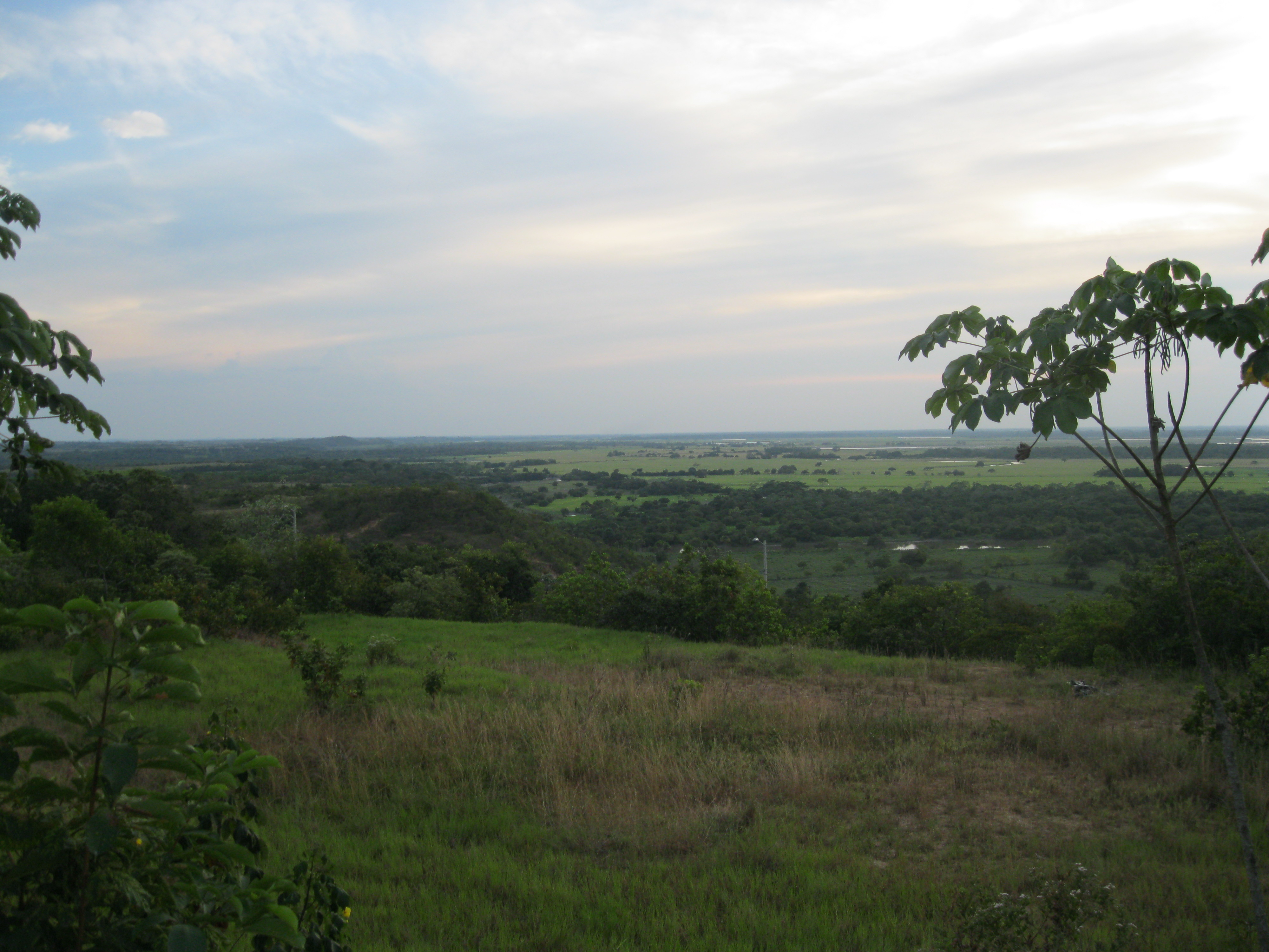 Panorama de la Llanura Oriental de Colombia.